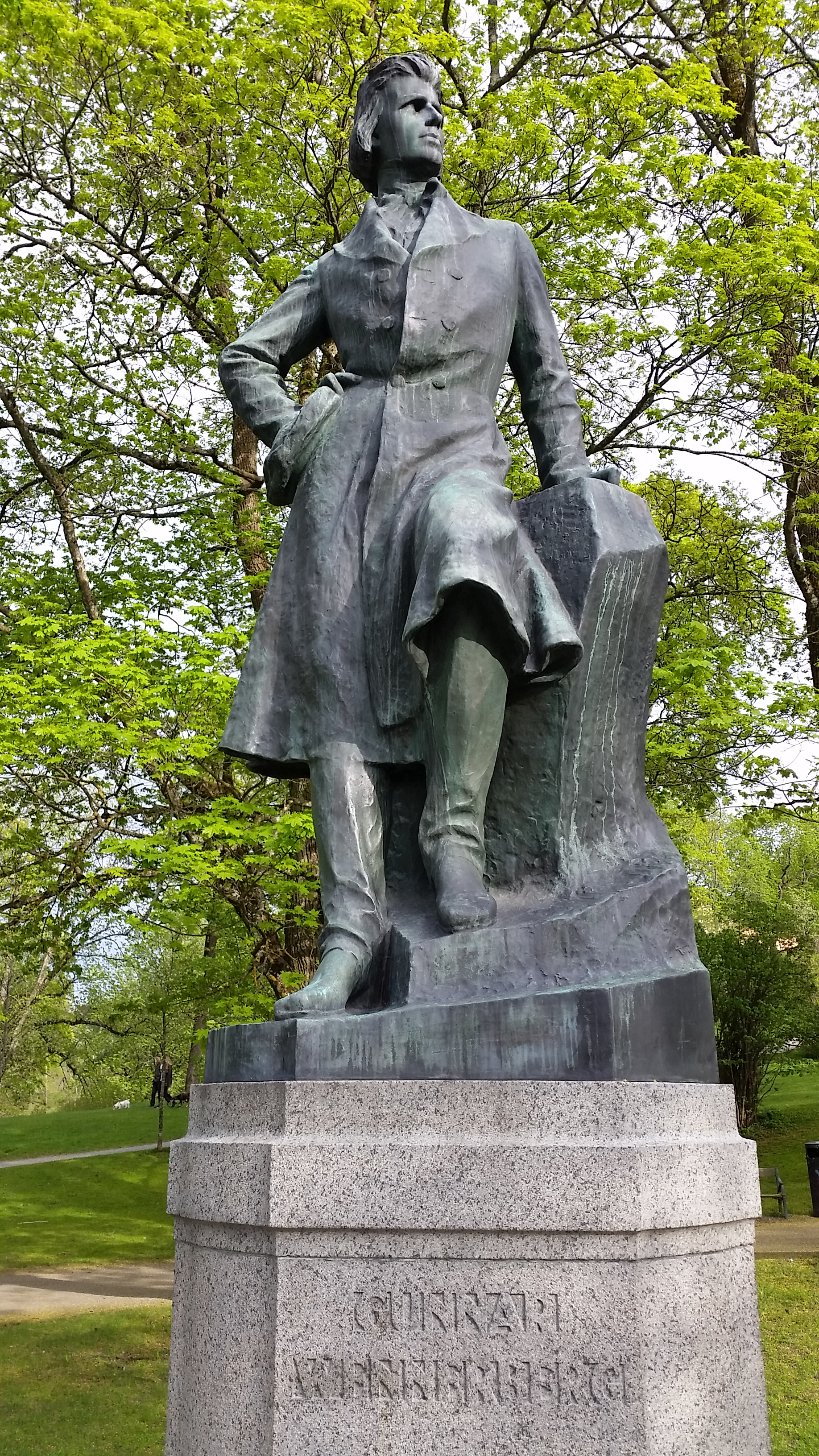 Gunnar Wennerberg (1911) - Theodor Lundberg. Uppsala